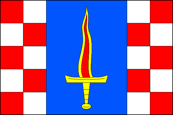 vlajka, Citonice, okres Znojmo